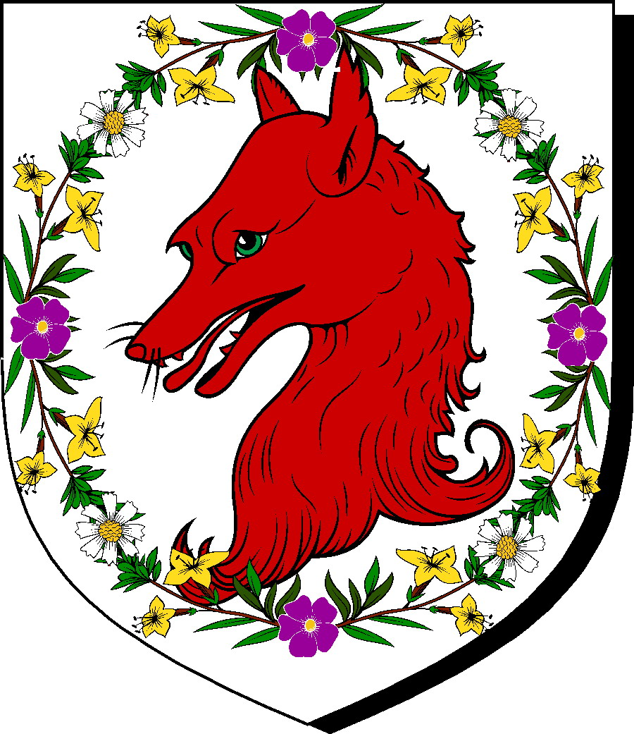 escudo libre en base a el libro cancion de hielo y fuego